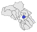 Mapa del terme comunal d'Estaver a l'Alta Cerdanya, a la Catalunya del Nord a partir d'un mapa de lliure disposició.